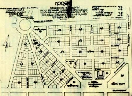 Burgas, Bulgarien; Stadtplan (Detail) . Die von Alexandar Georgiew gespendete Ländereien wurden zum Viertel Alexandar Georgiew (auch dem Stadtplan)